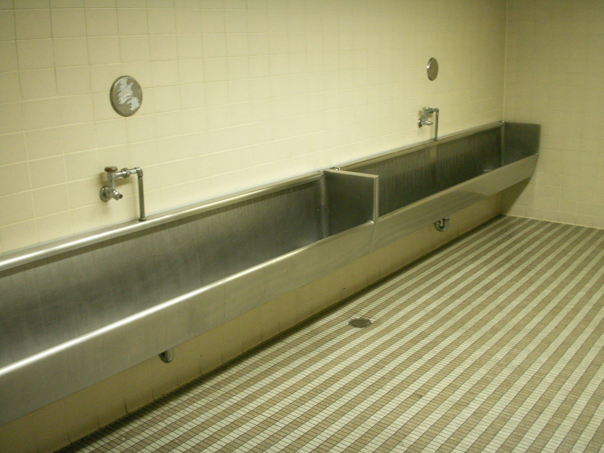 Urinal, Los Angeles, California